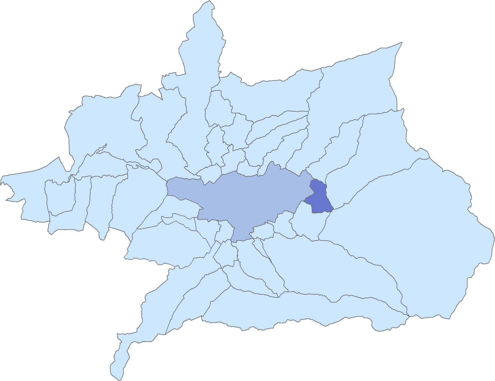 Situación del municipio de Dúdar respecto a la comarca de la Vega de Granada, en España.